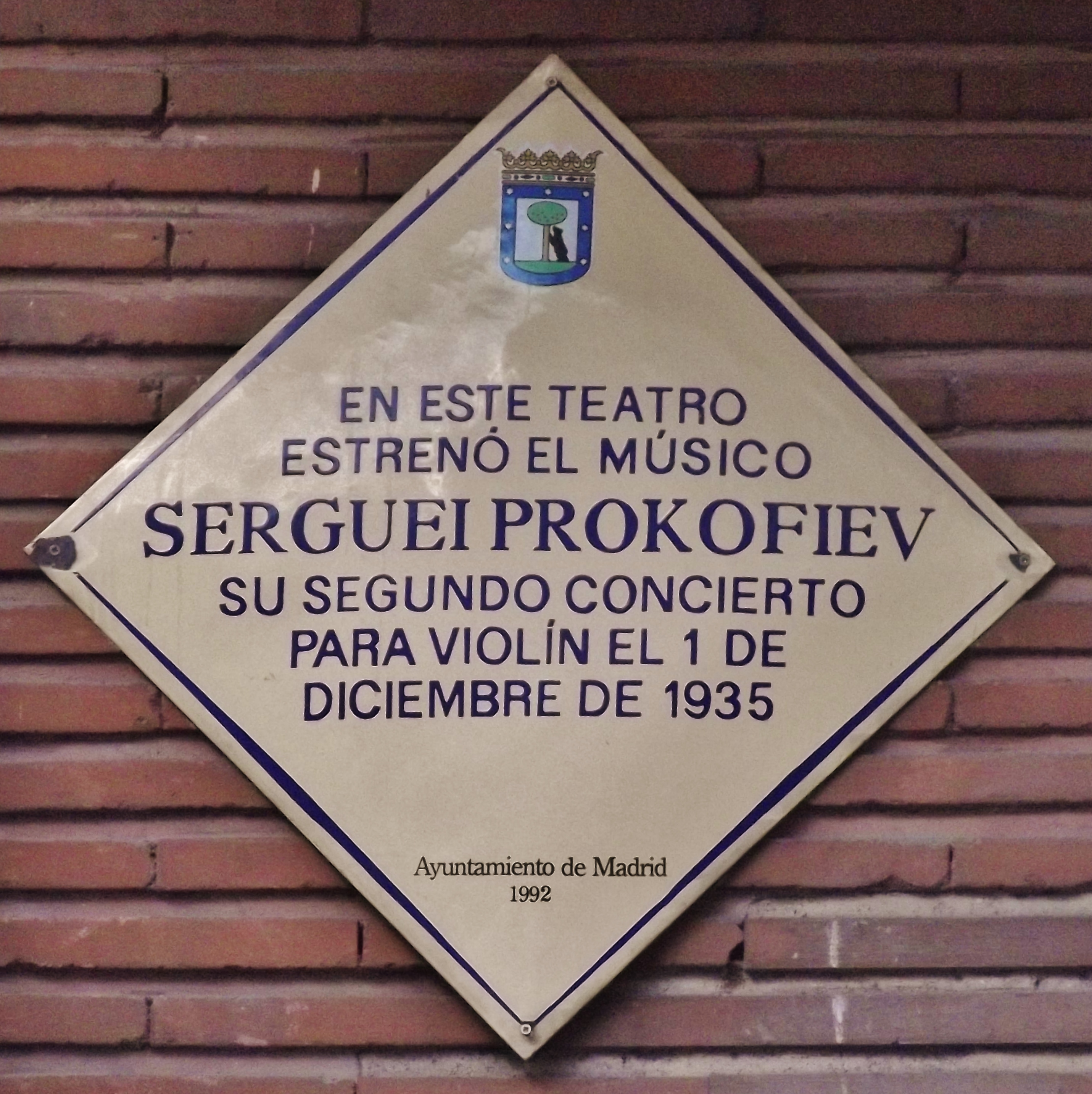 En este teatro estrenó el músico Serguei Prokofiev su segundo concierto para violín el 1 de diciembre de 1935